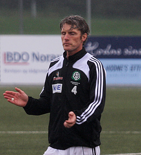 Cato André Hansen, Player of Stavanger Idrettsforening